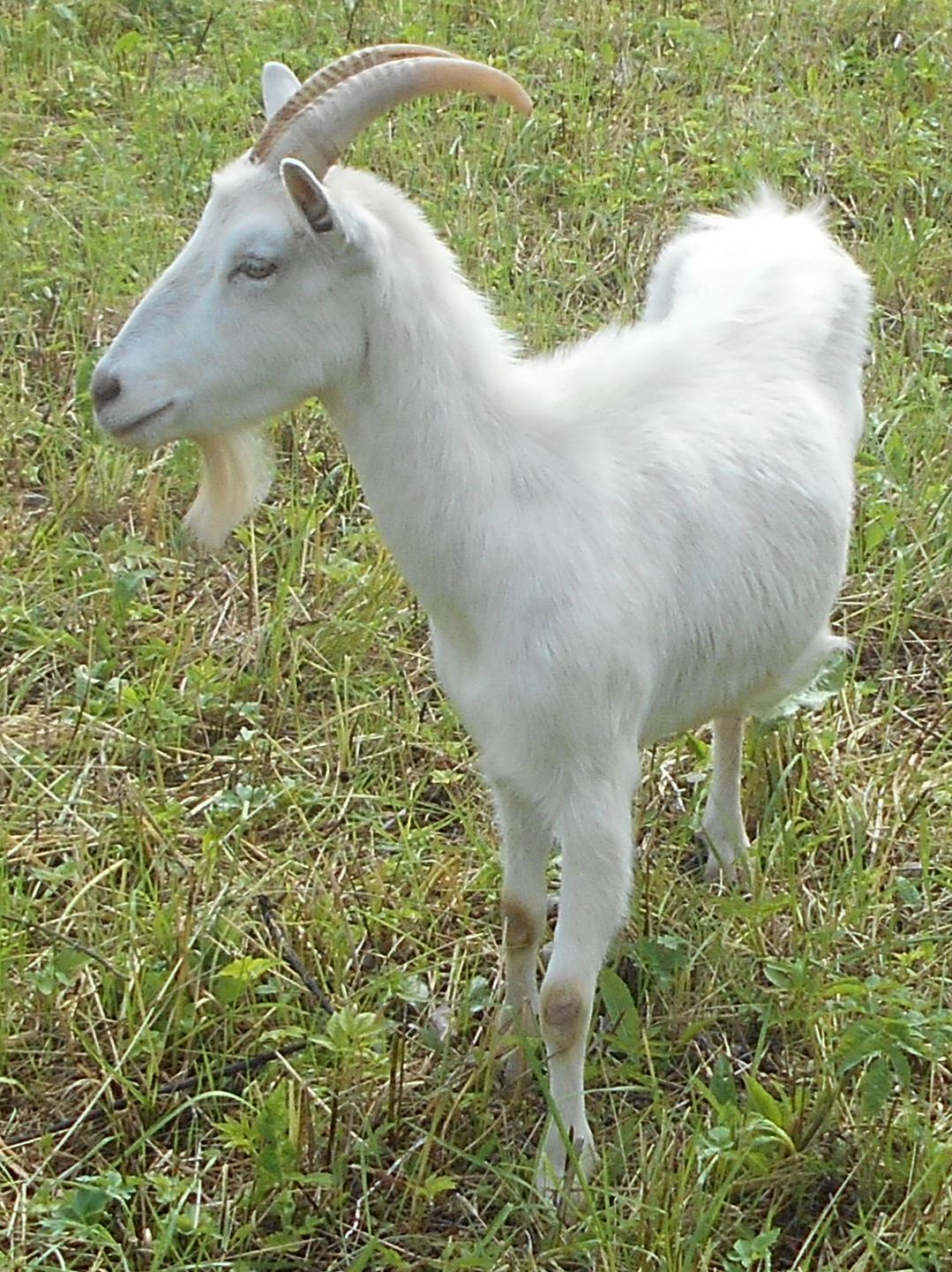 Русская белая порода